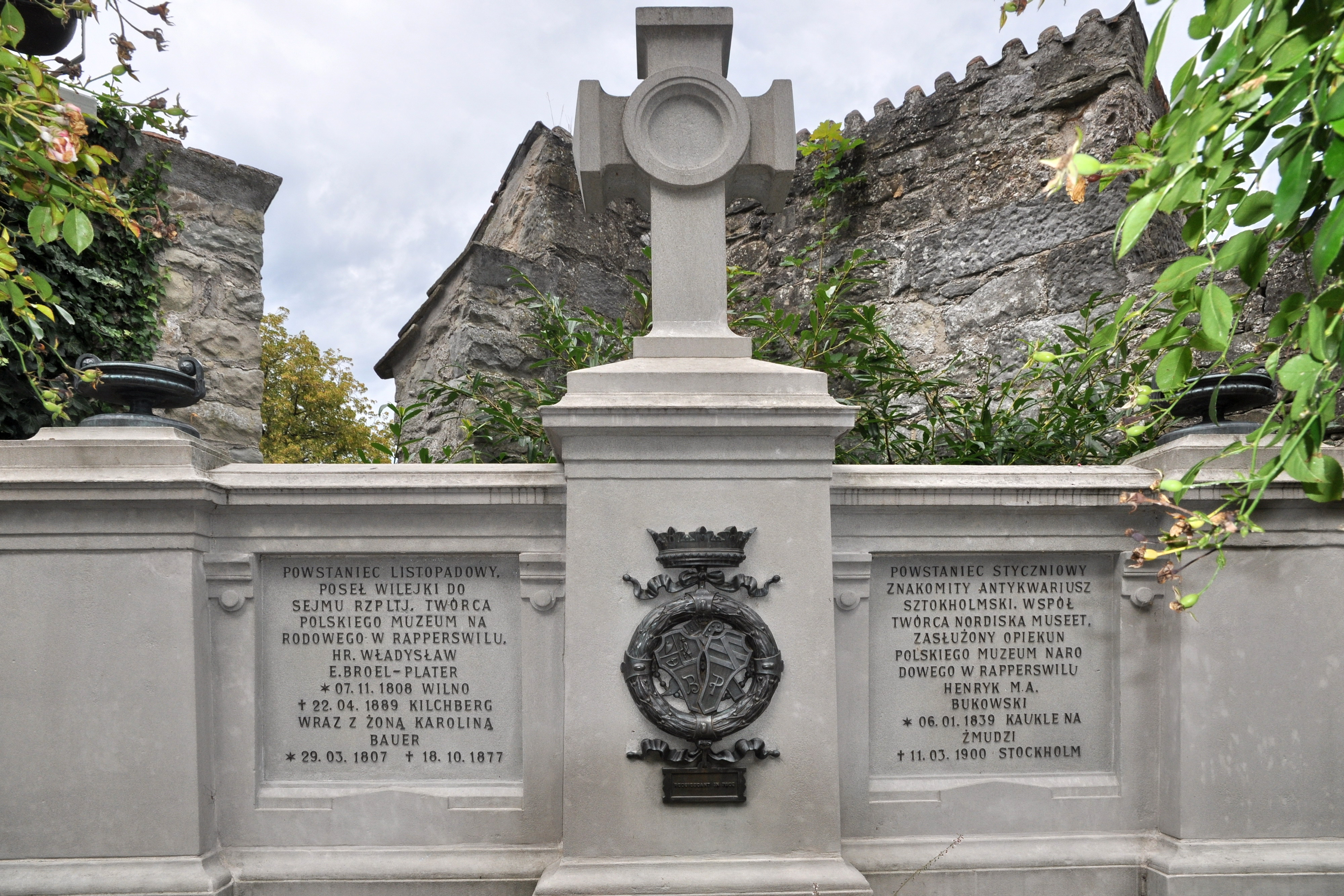 Kräutergarten und Polnisches Gartendenkmal (herbal garden and Polish garden memorial) at 'the' Schloss (castle) in Rapperswil (Switzerland)